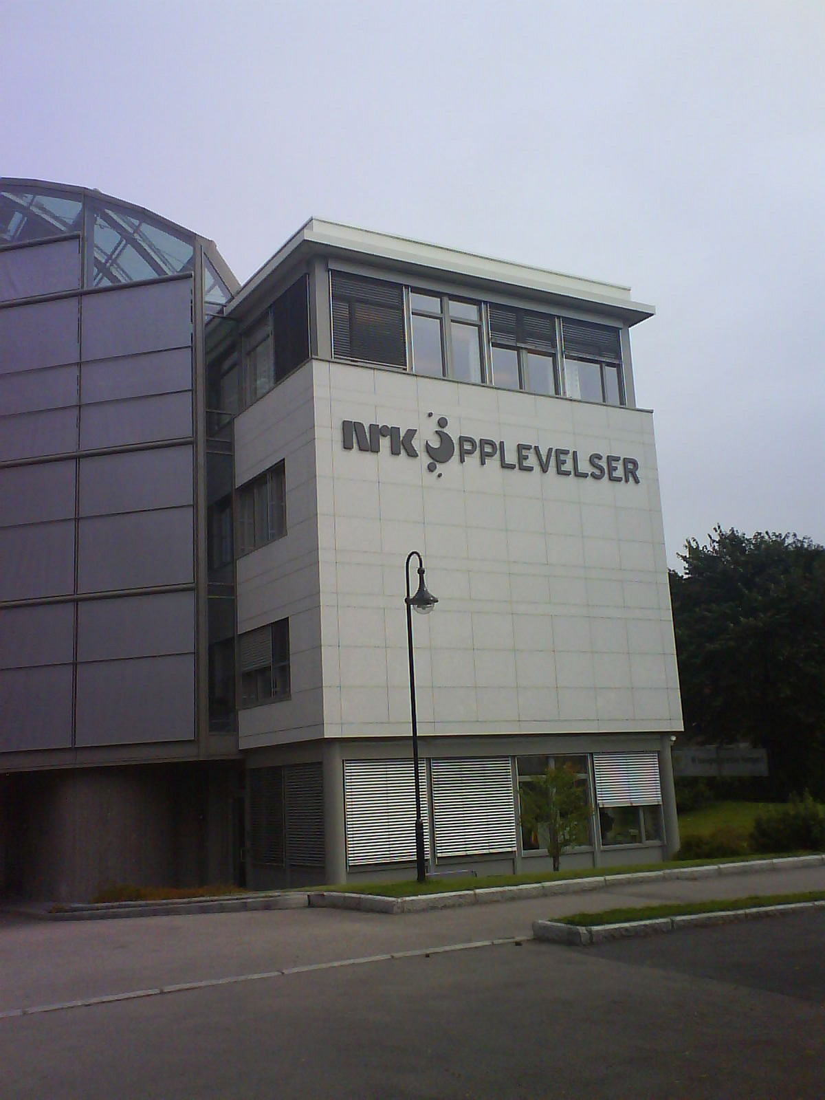 NRK Opplevelser, Marienlyst